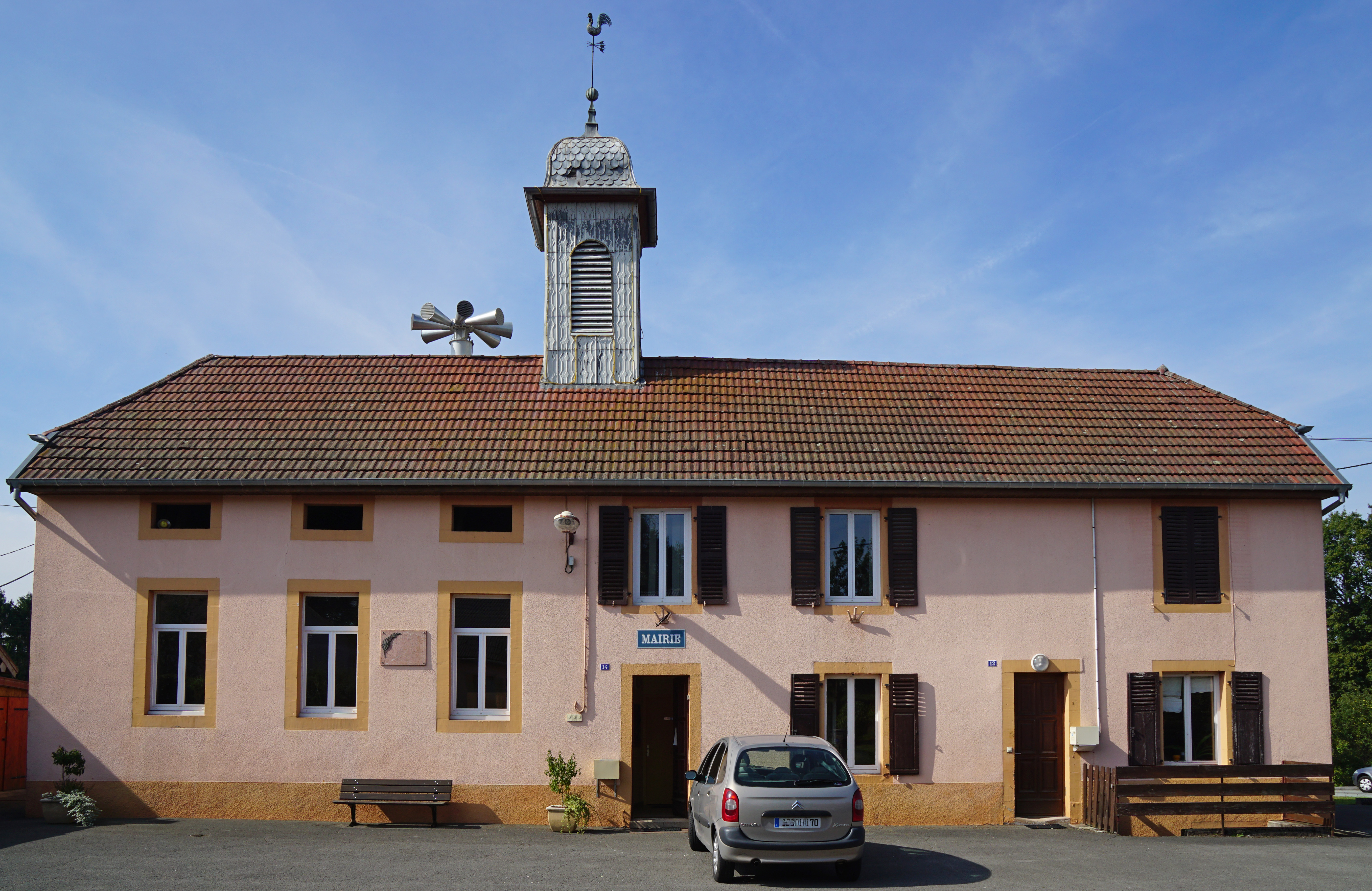 La mairie d'Échavanne.